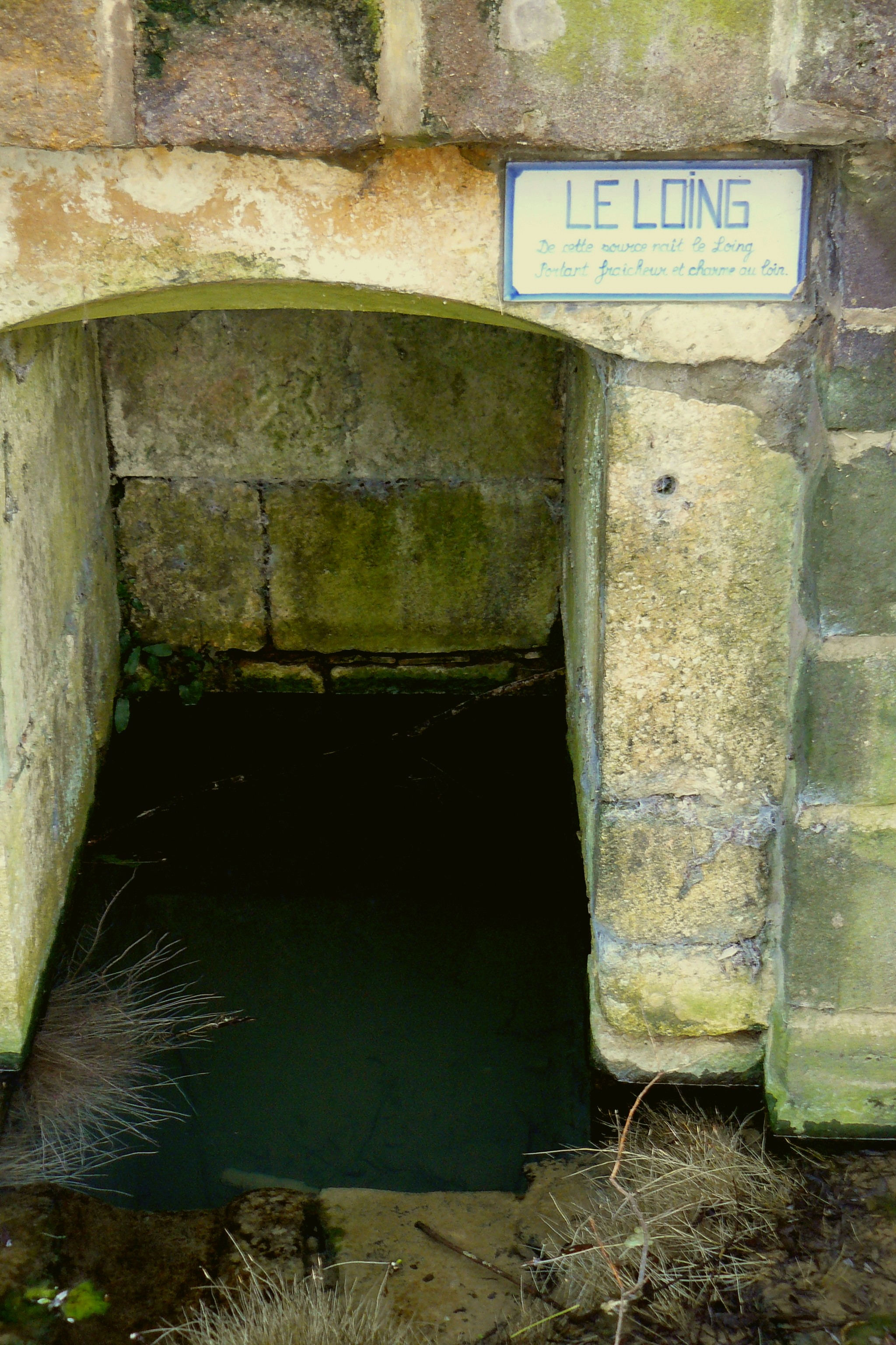 La source du Loing, à Ste-Colombe-sur-Loing (Yonne, France)